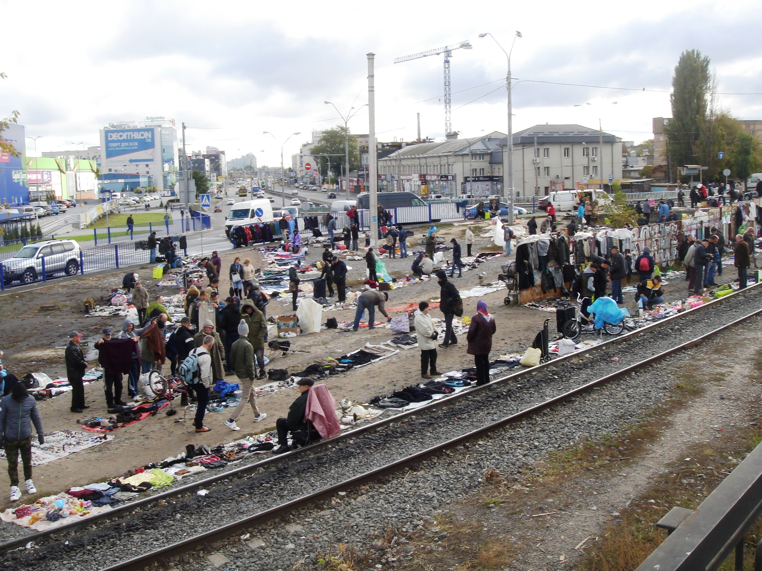 блошиный рынок возле платформы "Зенит"